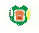 Brasão do município de Borba, Amazonas, Brasil.